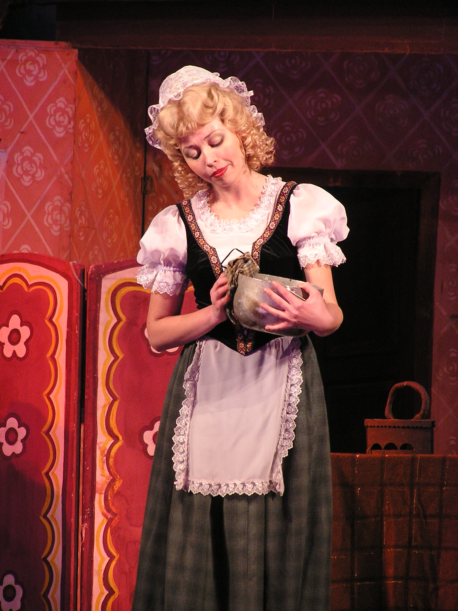 Донецкий театр оперы и балета. Постановка «Золушки» А. Спадавеккиа. Золушка дома.